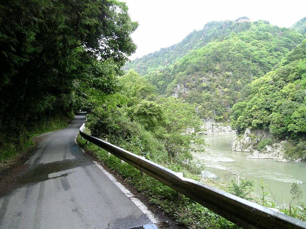 京都府道50号京都日吉美山線と保津峡